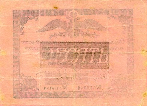 10 рублей 1819. Реверс.